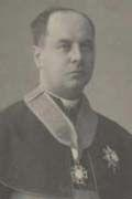 František Ehrmann (1866 - 1918), Český římskokatolický kněz a spisovatel.